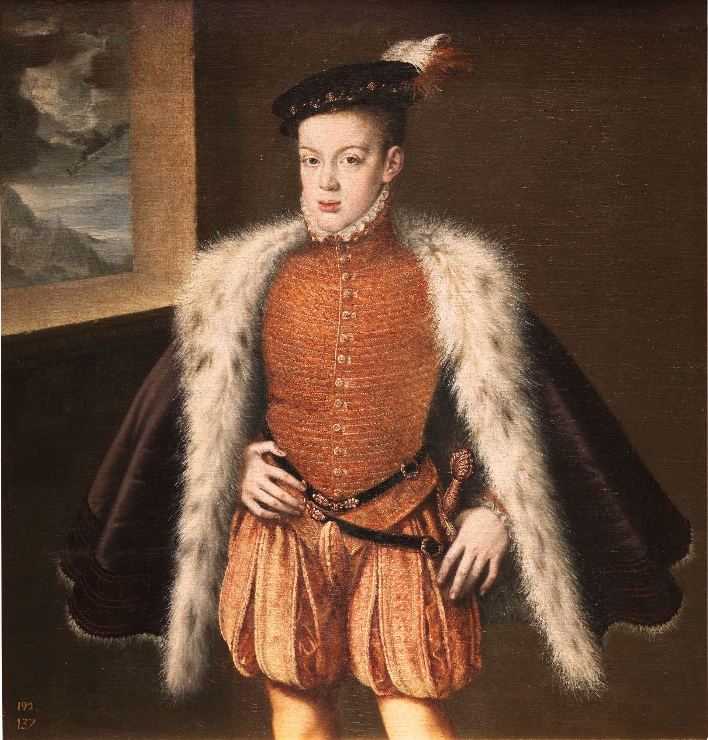 Retrato del príncipe de Asturias Carlos de Austria, que fue el hijo primogénito del rey Felipe II de España y de la reina María Manuela de Portugal, primera esposa de Felipe II.